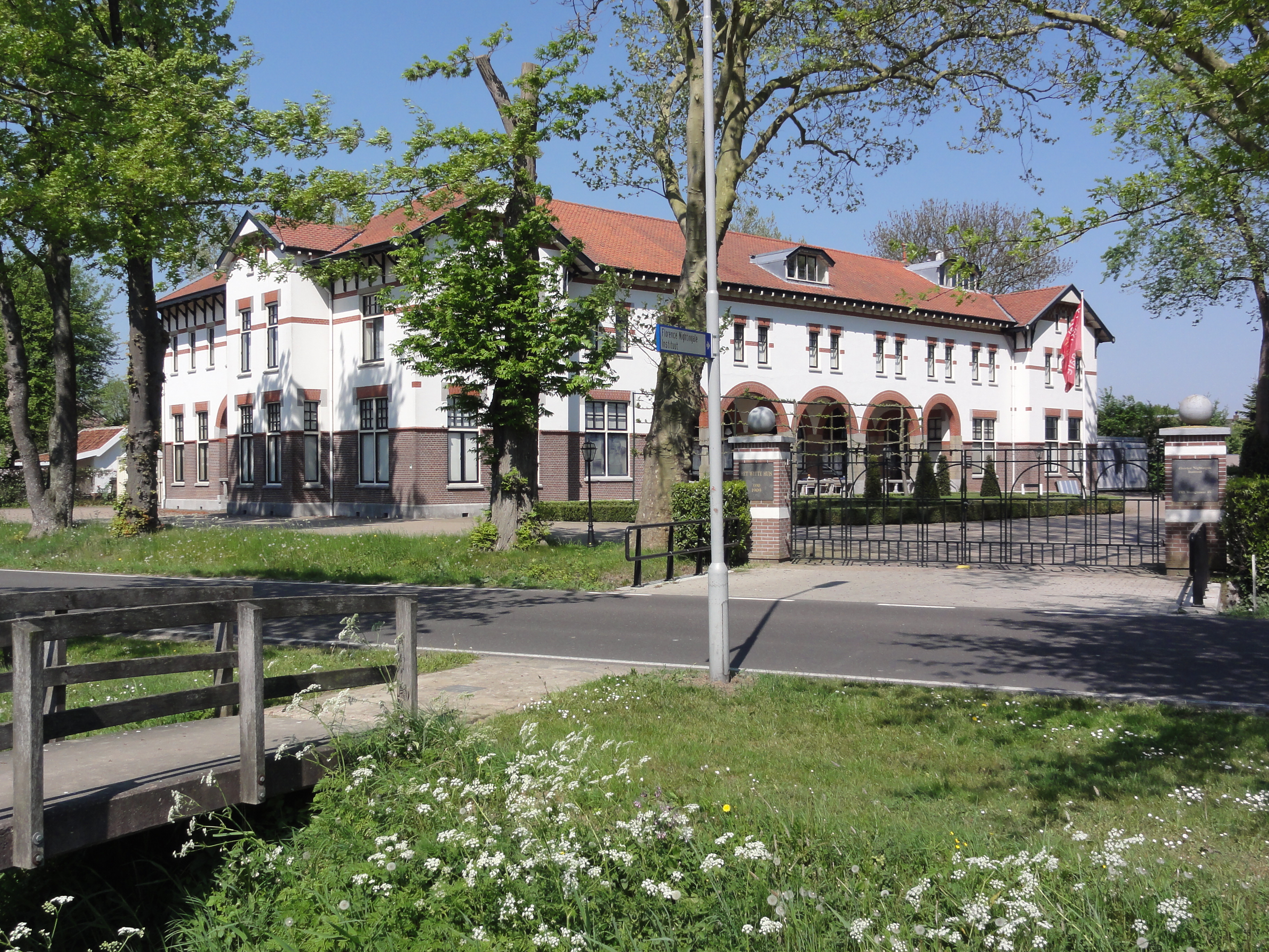 Zetten (Overbetuwe) Het Witte Huis, Florence Nightingale instituut